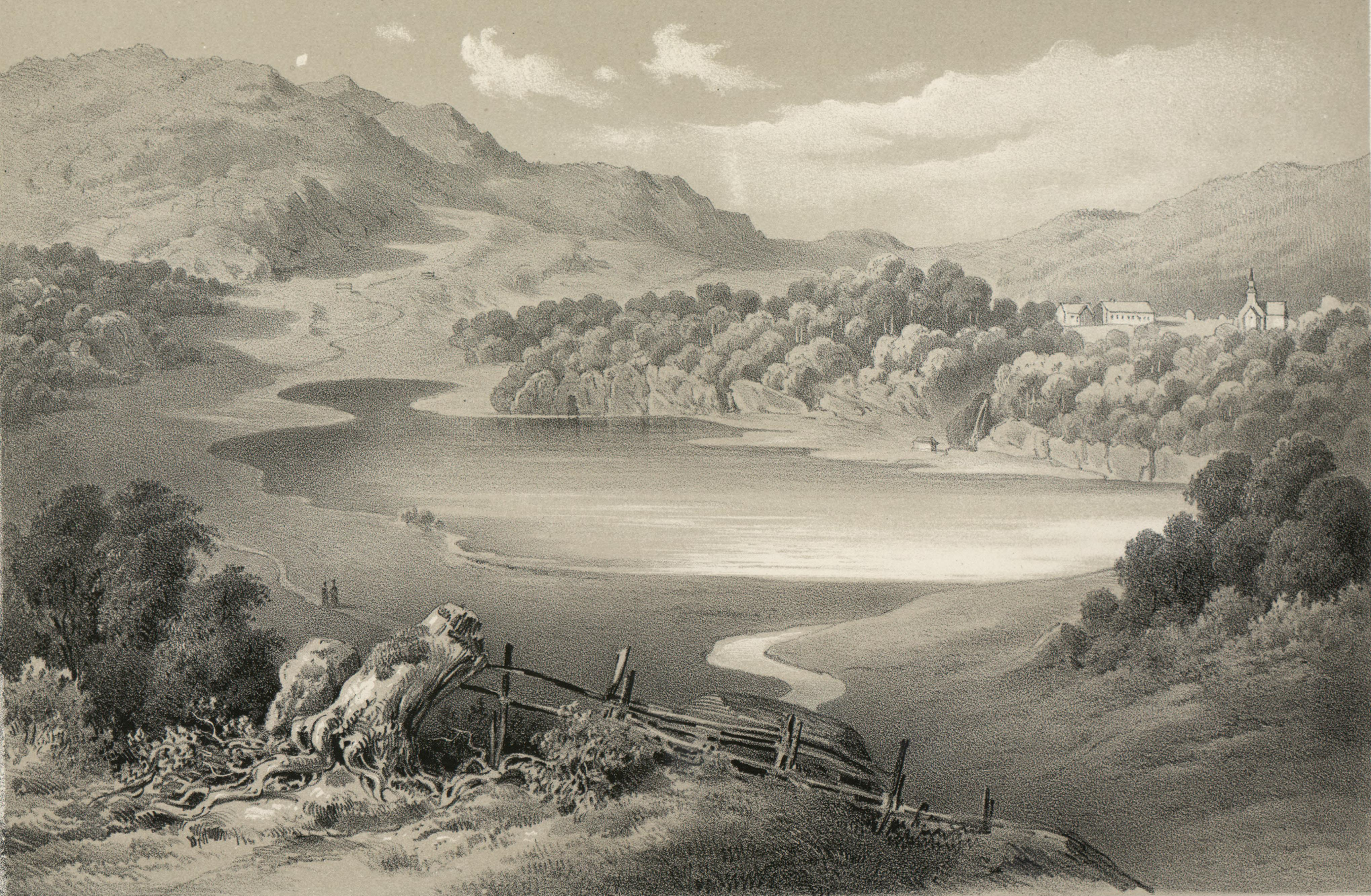 Illustrasjon hentet fra boken "Norge fremstillet i Tegninger" av Asbjørnsen, P.Chr. og utgitt av Chr. Tønsberg (no, 1848)